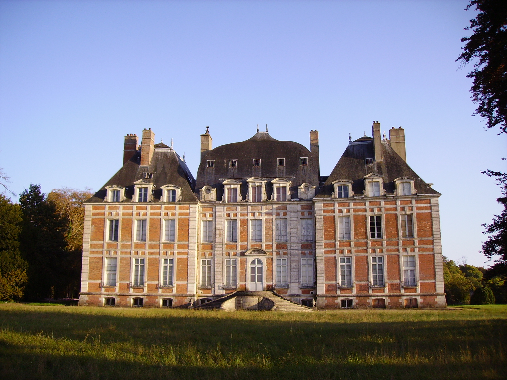 Château de Montalivet-Lagrange, façade nord. Cher, Centre, France.